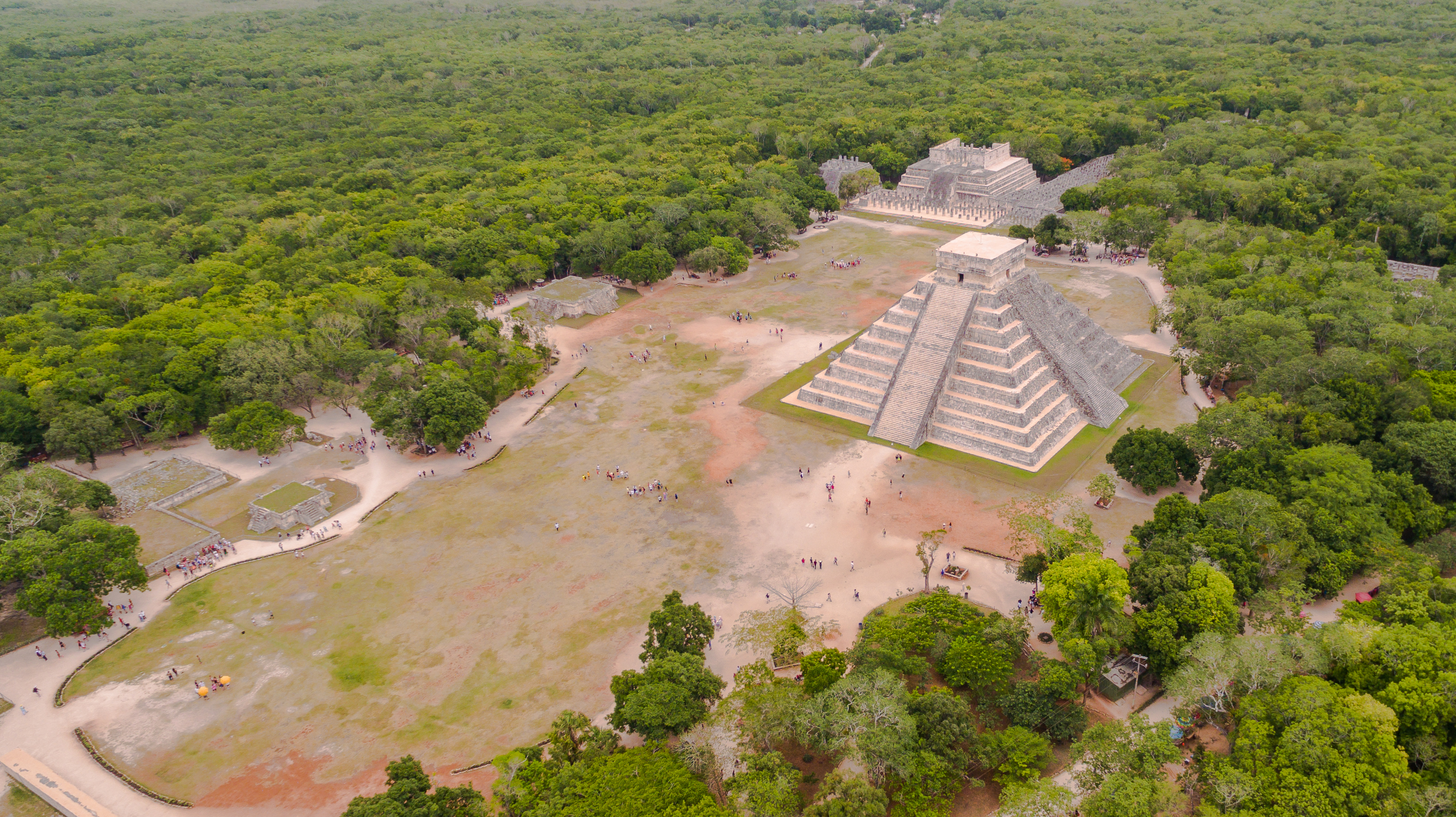 UNESCO World Heritage Site. In 2007, Chichen Itza's El Castillo was named one of the New Seven Wonders.